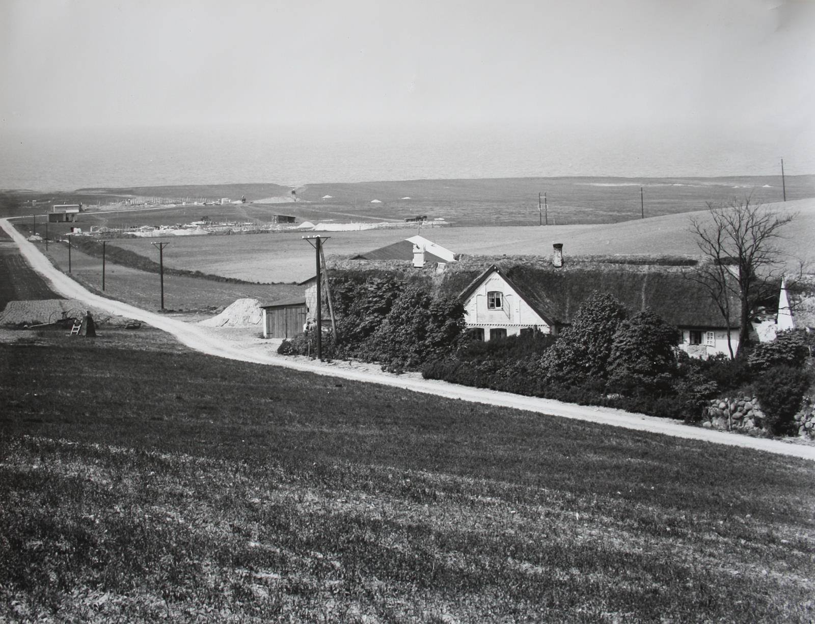 Byggeriet af Skamlebæk Radio med Skamlebækgården til højre. 1929